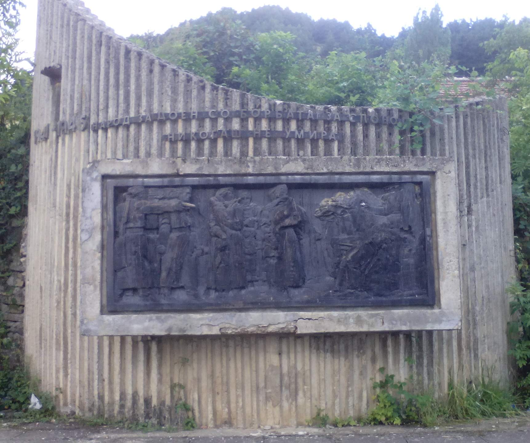 Споменик од НОБ во селото Лавци